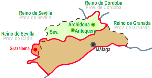 TERRITORIOS Fregenal - Pérdida Grazalema - Incorporación Nuevas Poblaciones de Andalucía y Sierra Morena Reino de Sevilla Reino anterior a 1833 Prov. de Málaga Provincia nueva de 1833 Sev: Sevilla - - - Límite de la provincia __ Límite del antiguo reino